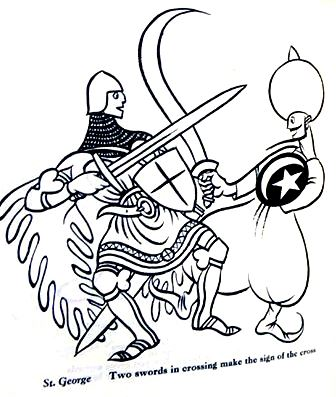 Illustrazione di Thomas Derrick a "Il tacchino e il turco" di G. K. Chesterton.